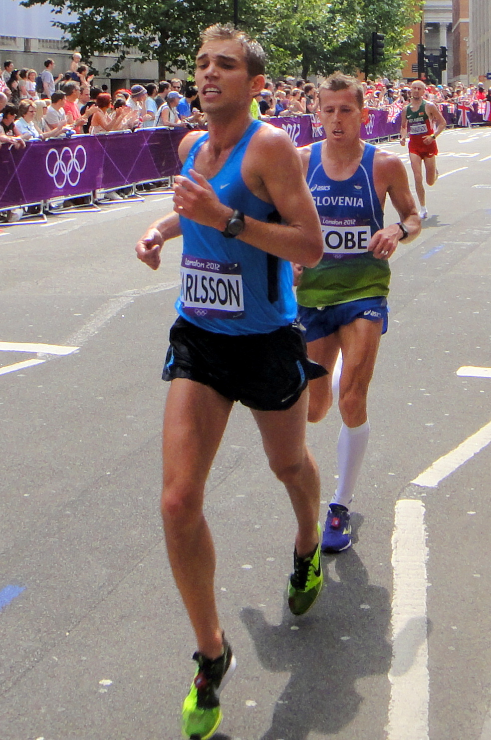 Kari Steinn Karlsson (Iceland) & Primoz Kobe (Slovenia) - London 2012 Men's Marathon